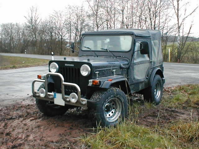 Mahindra